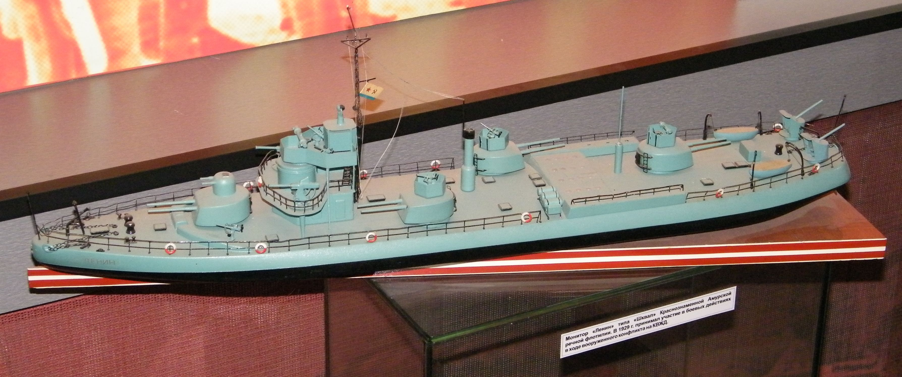 Монитор "Ленин" типа "Шквал", Амурская военная флотилия